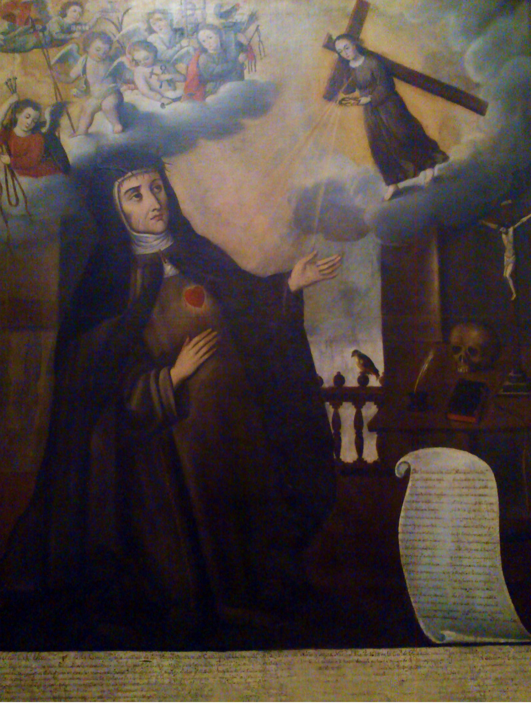 Retrato alegórico de Francisca Josefa de la Concepción del Castillo y Guevara.